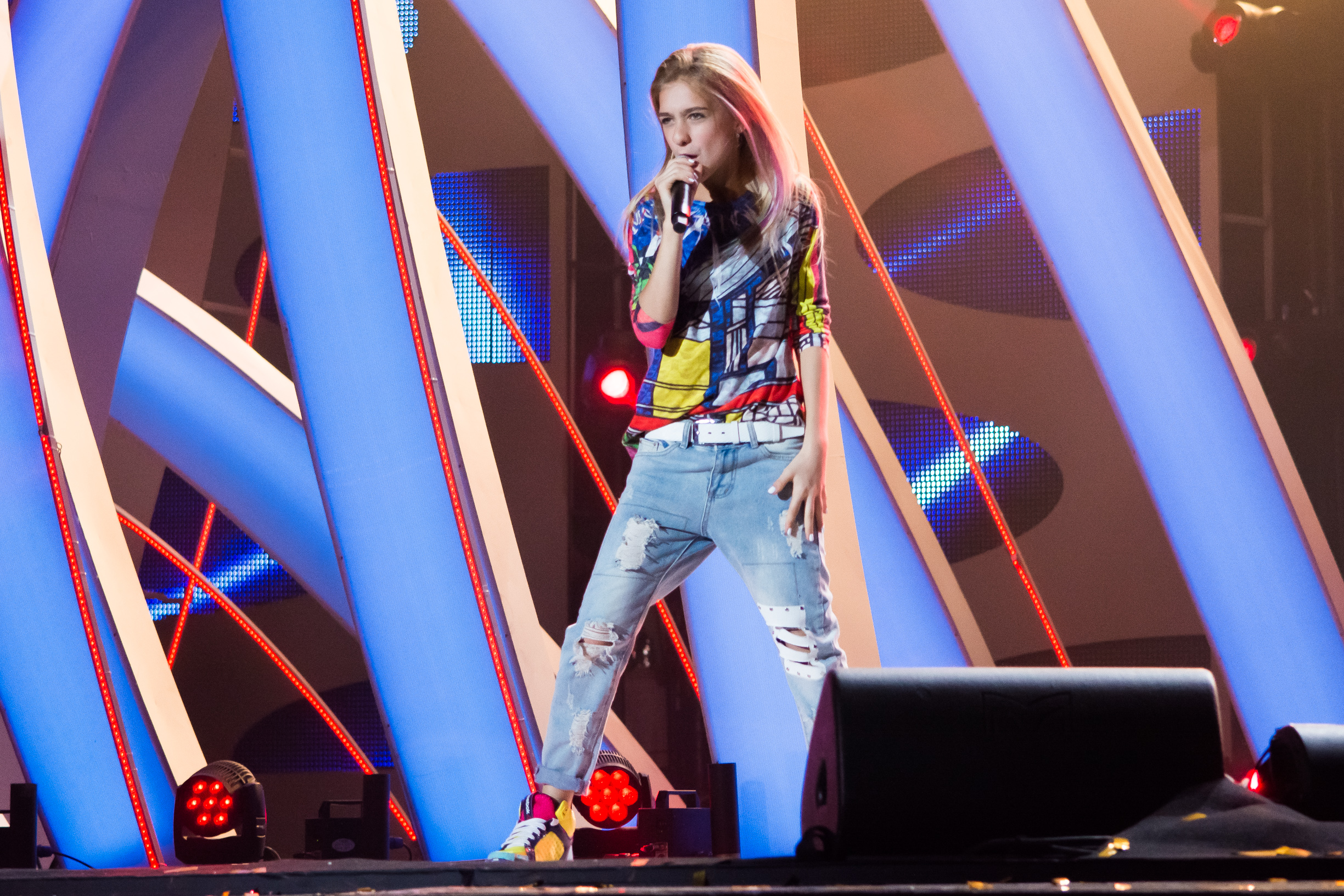 Зина Куприянович на Детской Песни года